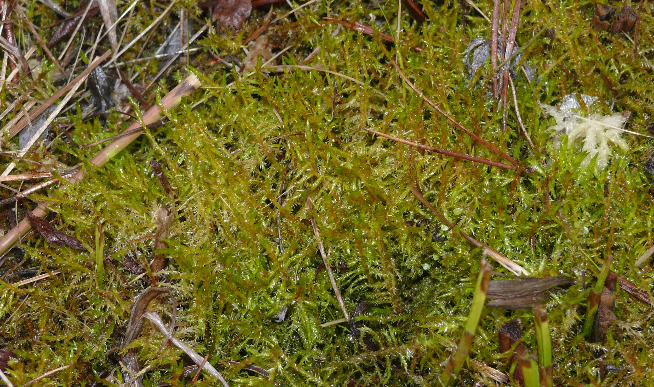 Calliergonella cuspidata, Virngrund, Germany